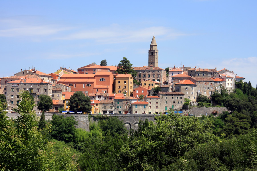 Labin, Stari Grad